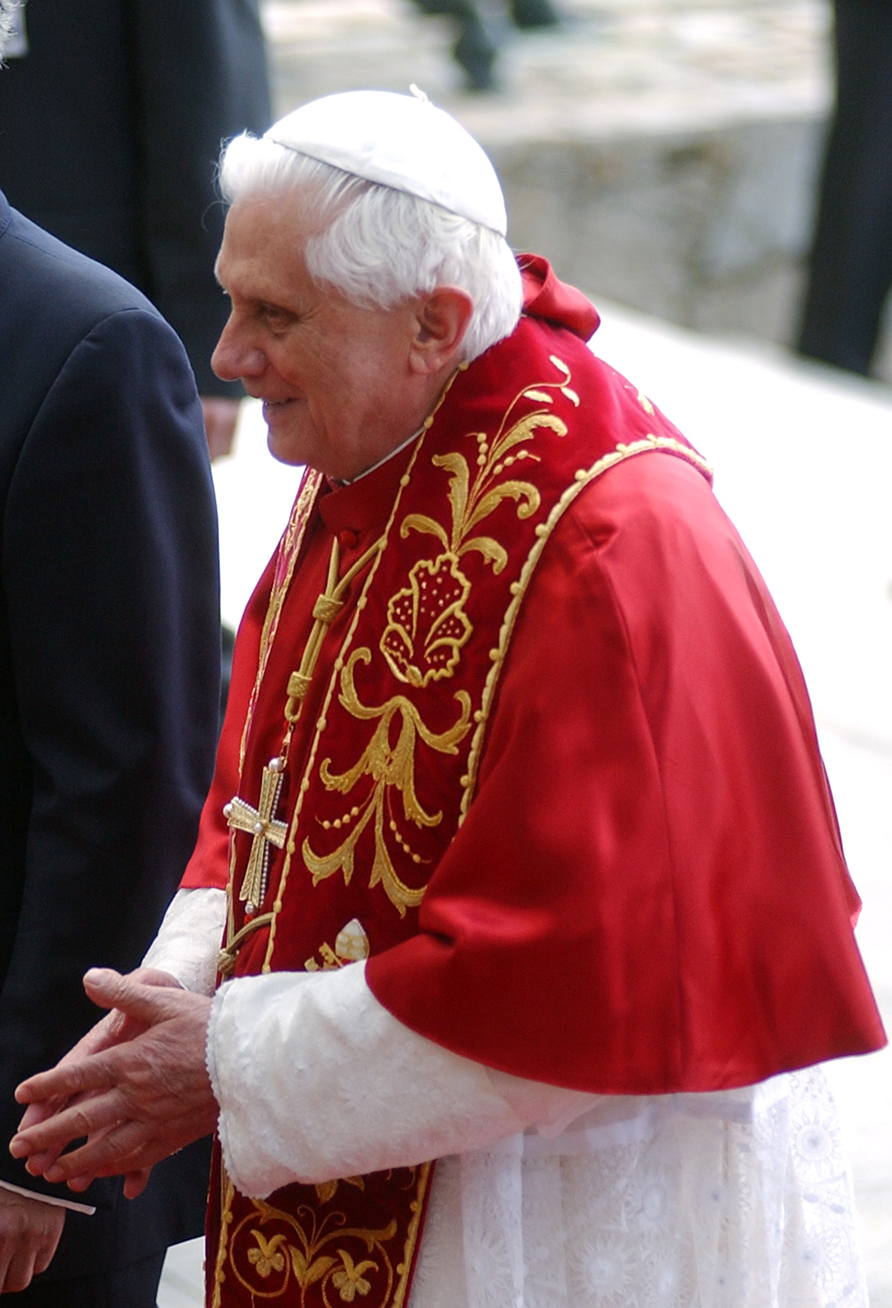 Papa Bento XVI chega ao Palácio dos Bandeirantes, residência oficial do governador do estado de São Paulo.